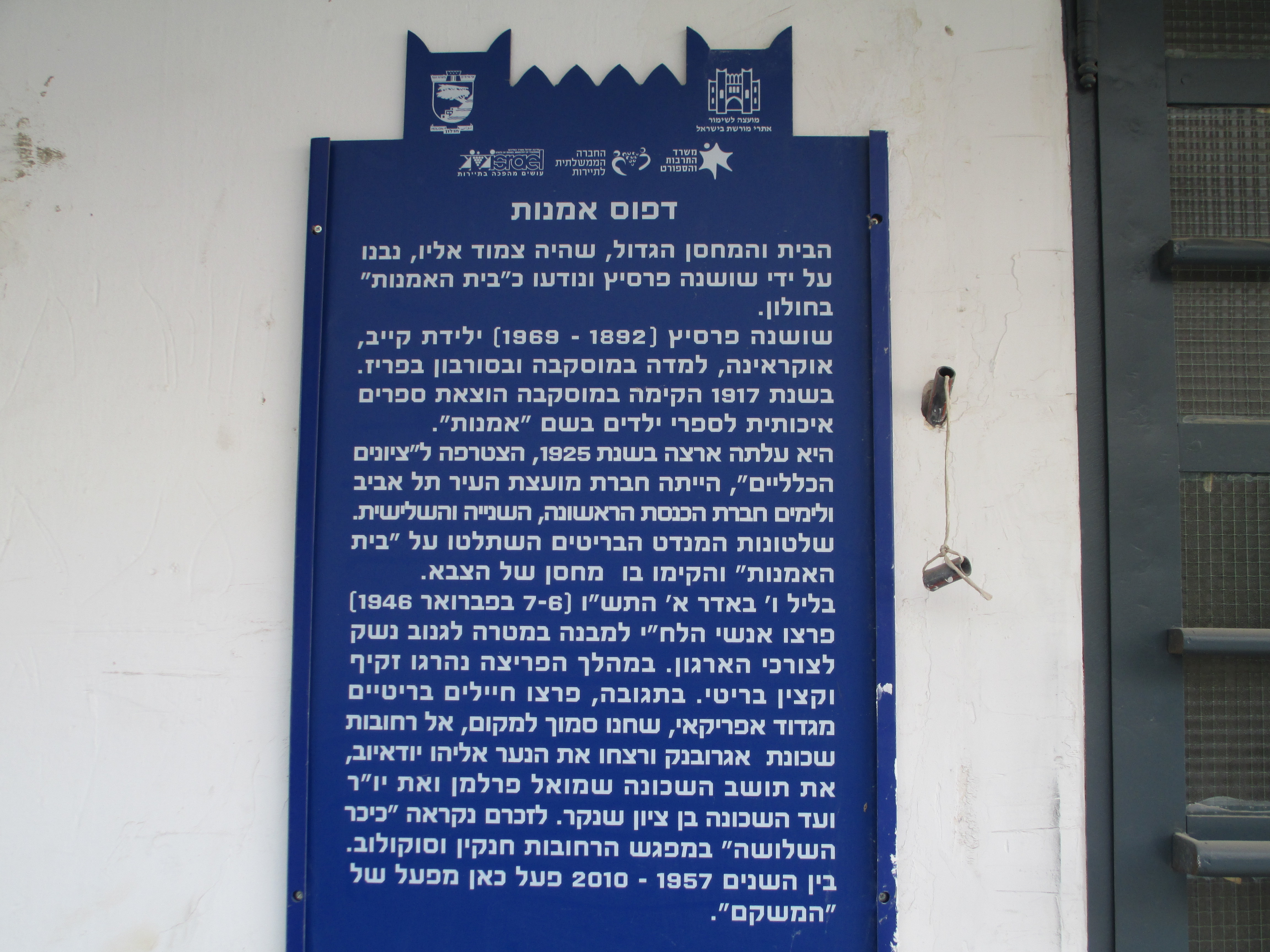 לוחית זיכרון על בית המשקם בחולון